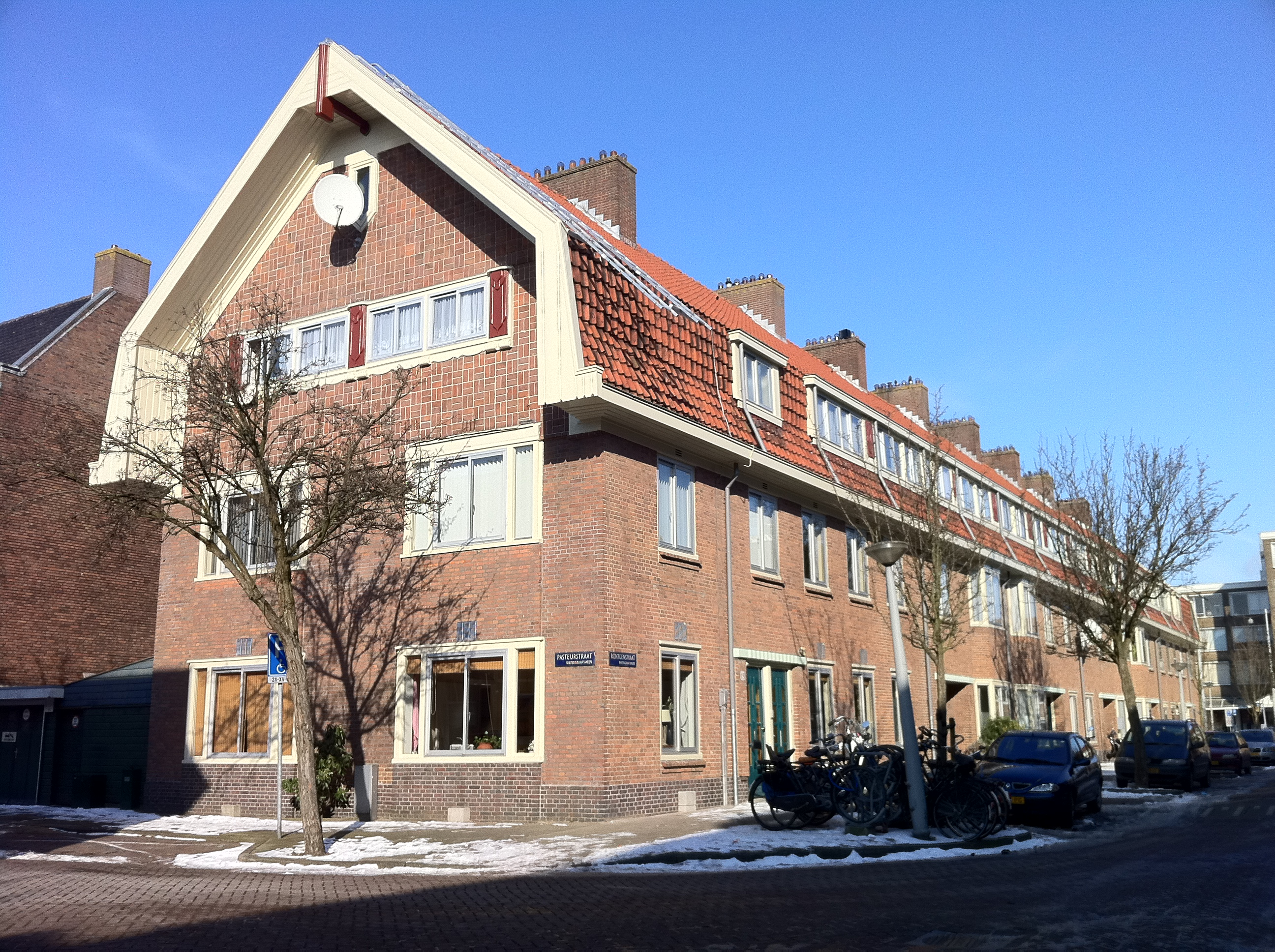 Amsterdam. Hoek Pasteurstraat/ Rontgenstraat. 33 middenstandswoningen gebouwd door de Coöperatieve Woningvereniging Watergraafsmeer in 1922, architecten Jan Gratama en Gerrit Versteeg. Wegens financiële problemen samen met een complex van 81 woningen aan de Willem Beukelsstraat en omgeving overgenomen door de gemeente Amsterdam, die ze via de Gemeentelijke Woningdienst Amsterdam ging verhuren als betaalbare sociale huurwoningen. Tegenwoordig verhuurd door woningcorporatie Ymere. Waar mogelijk gaan leegkomende woningen zoals deze in de verkoop.